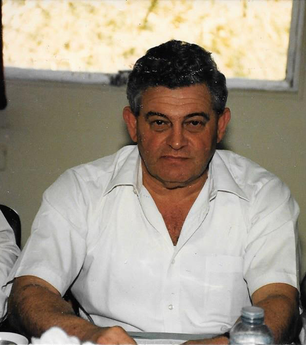 שאול רזיאל